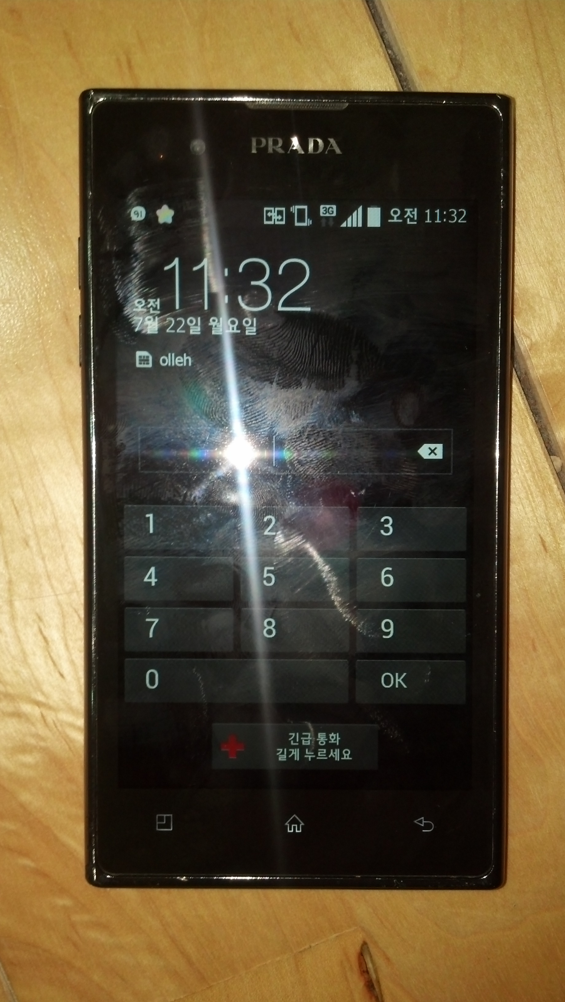 LG 프라다 3.0